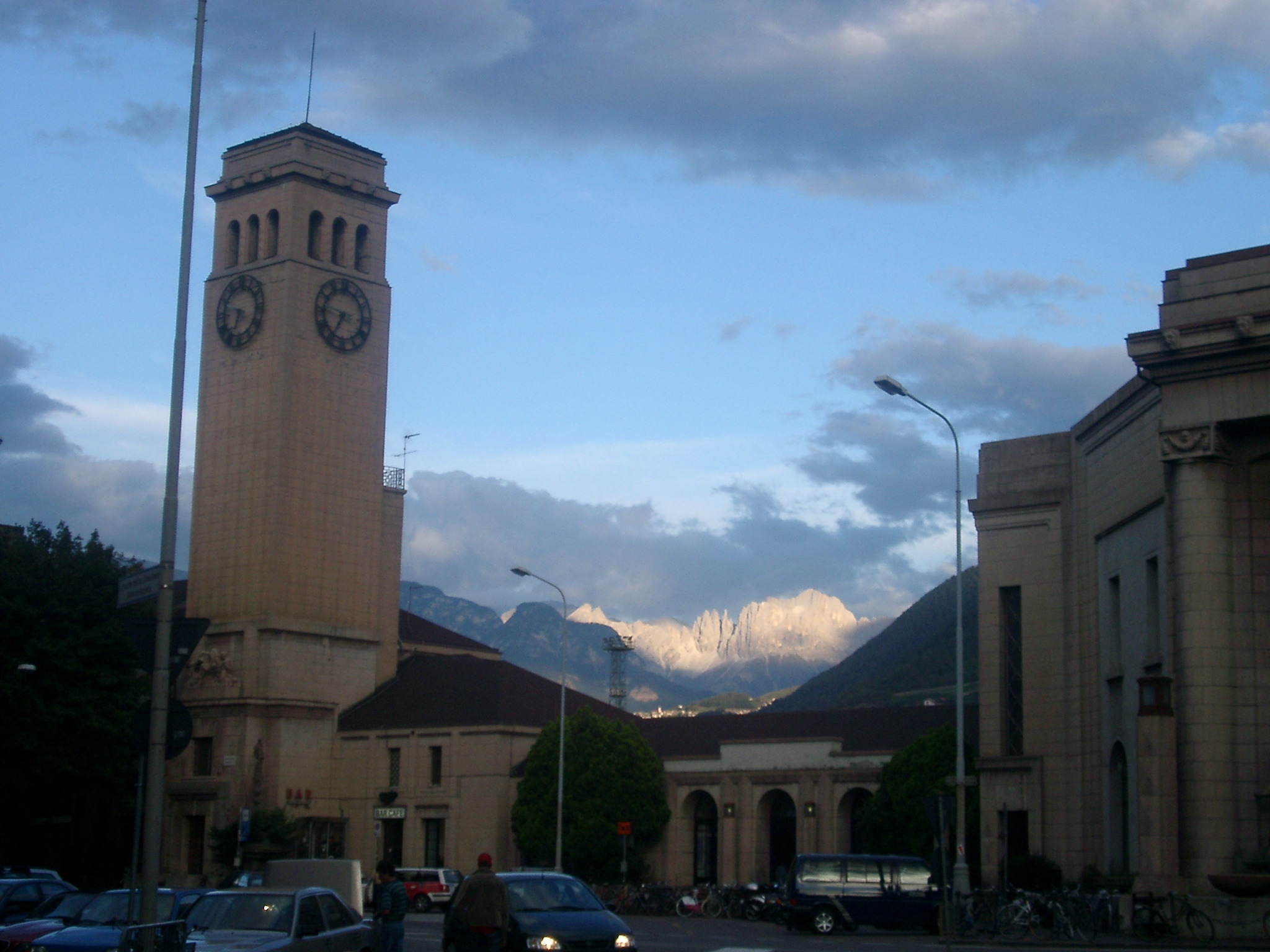 *Der unter Mussolini errichtete Fassade des Bozner Bahnhofs mit Rosengarten im Hintergrund, abends, September 2003. selbst fotografiert